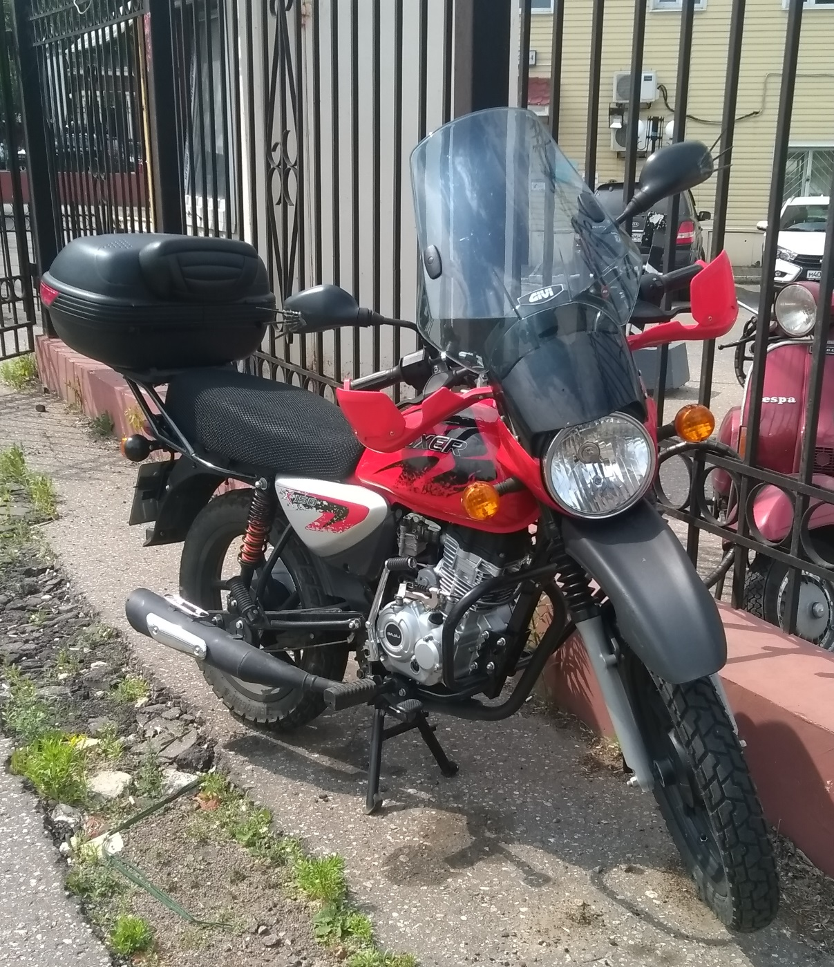 Один из мотоциклов, эксплуатирующихся в Москве. Владельцем дополнительно установлено ветровое стекло, защита рук, центральный кофр.